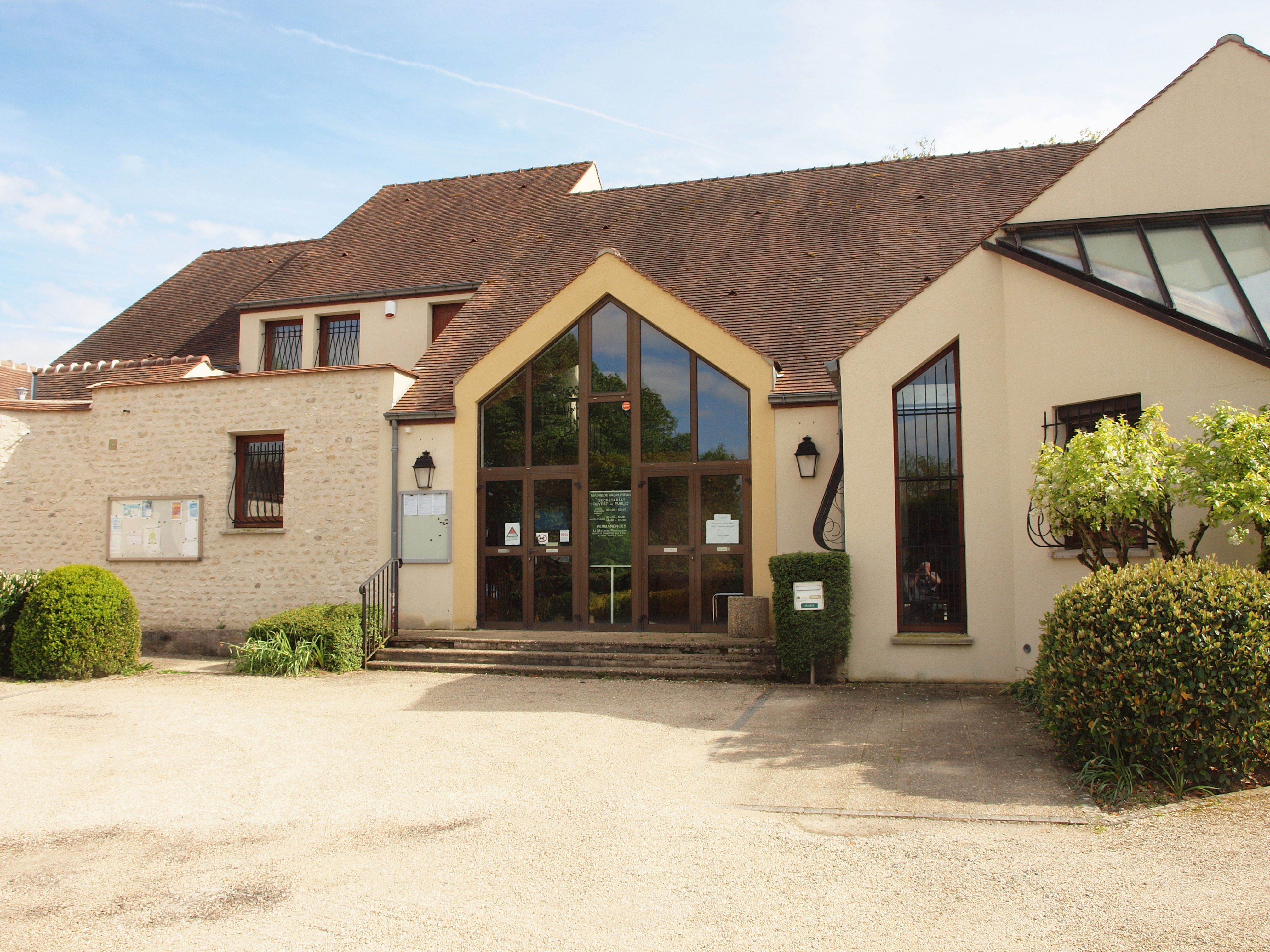 Mairie de Valpuiseaux (Essonne, France)